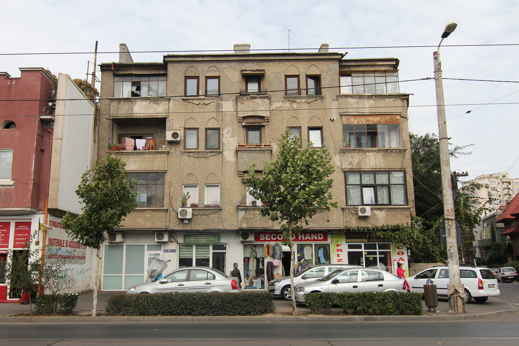 Casă pe Dudești